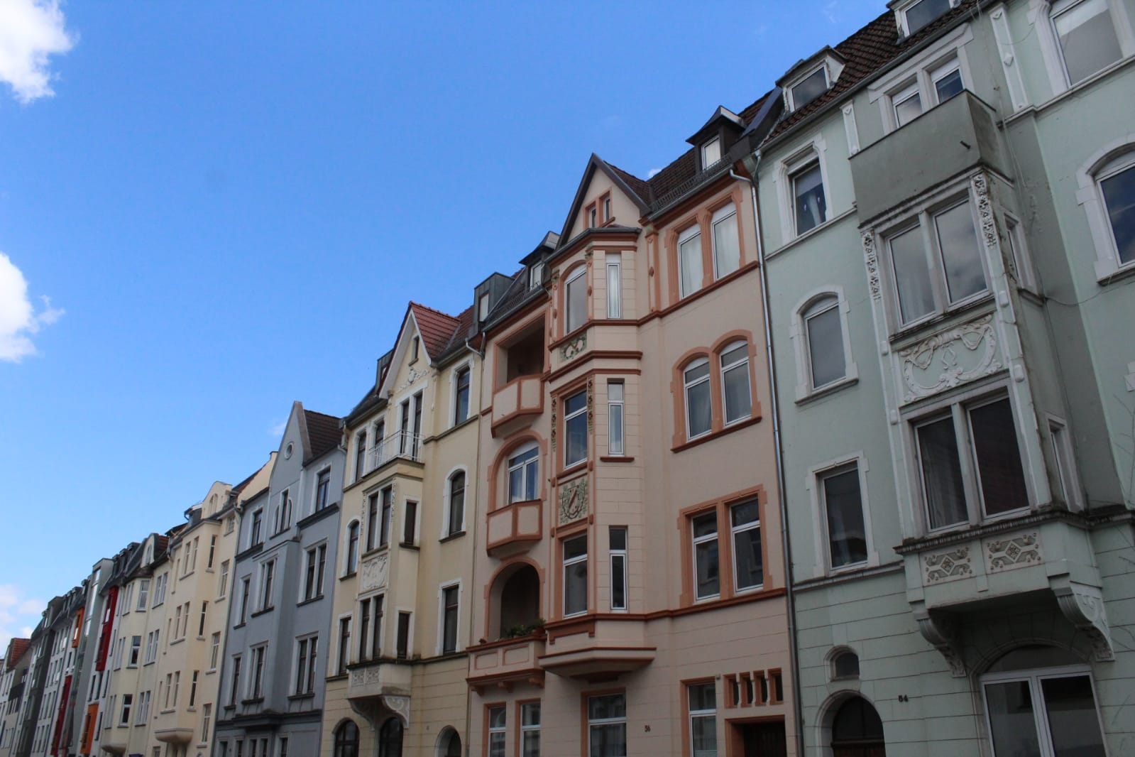 Dürkoppviertel Bielefeld2